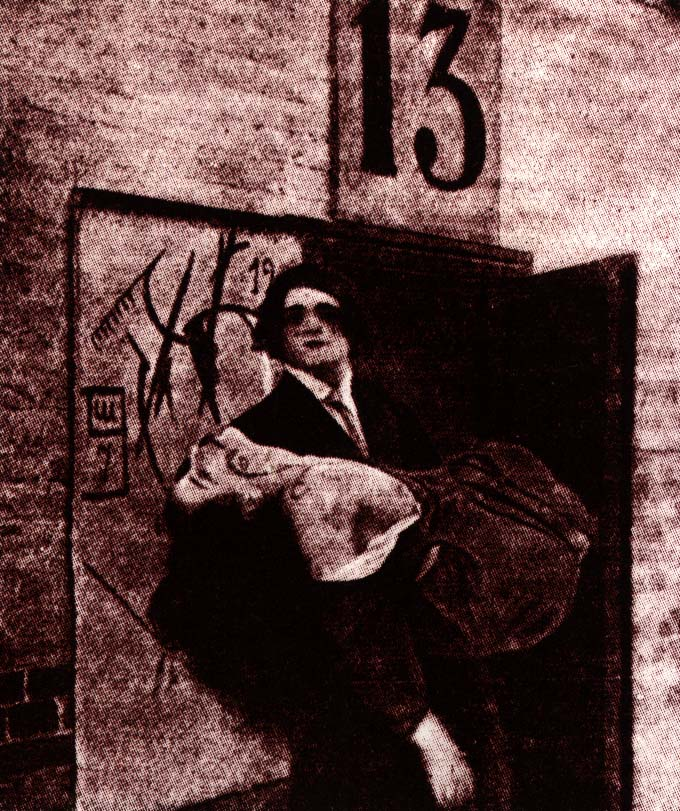 Драма в кабаре футуристов № 13